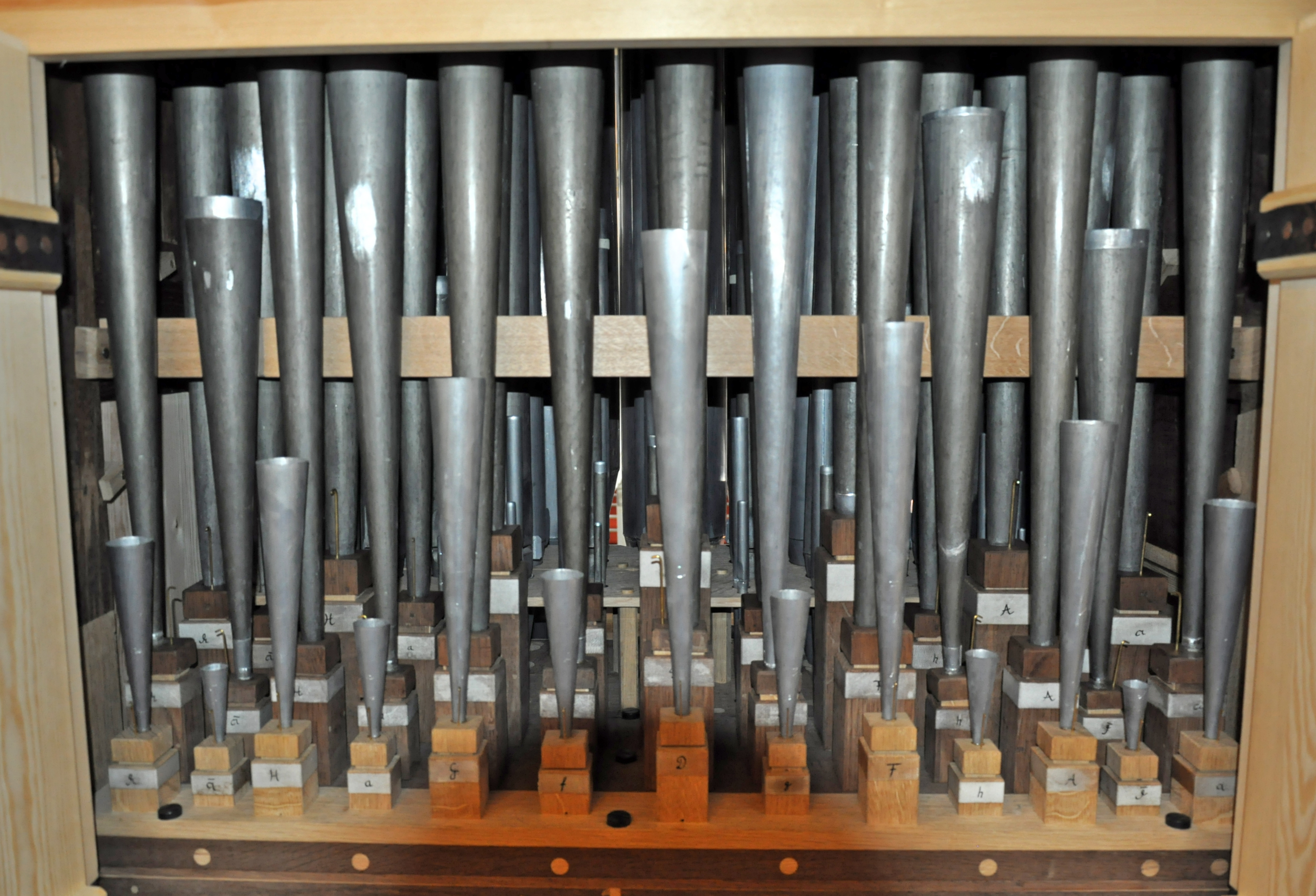 Pfeifen der Orgel in St. Mauritius, Hollern, Landkreis Stade